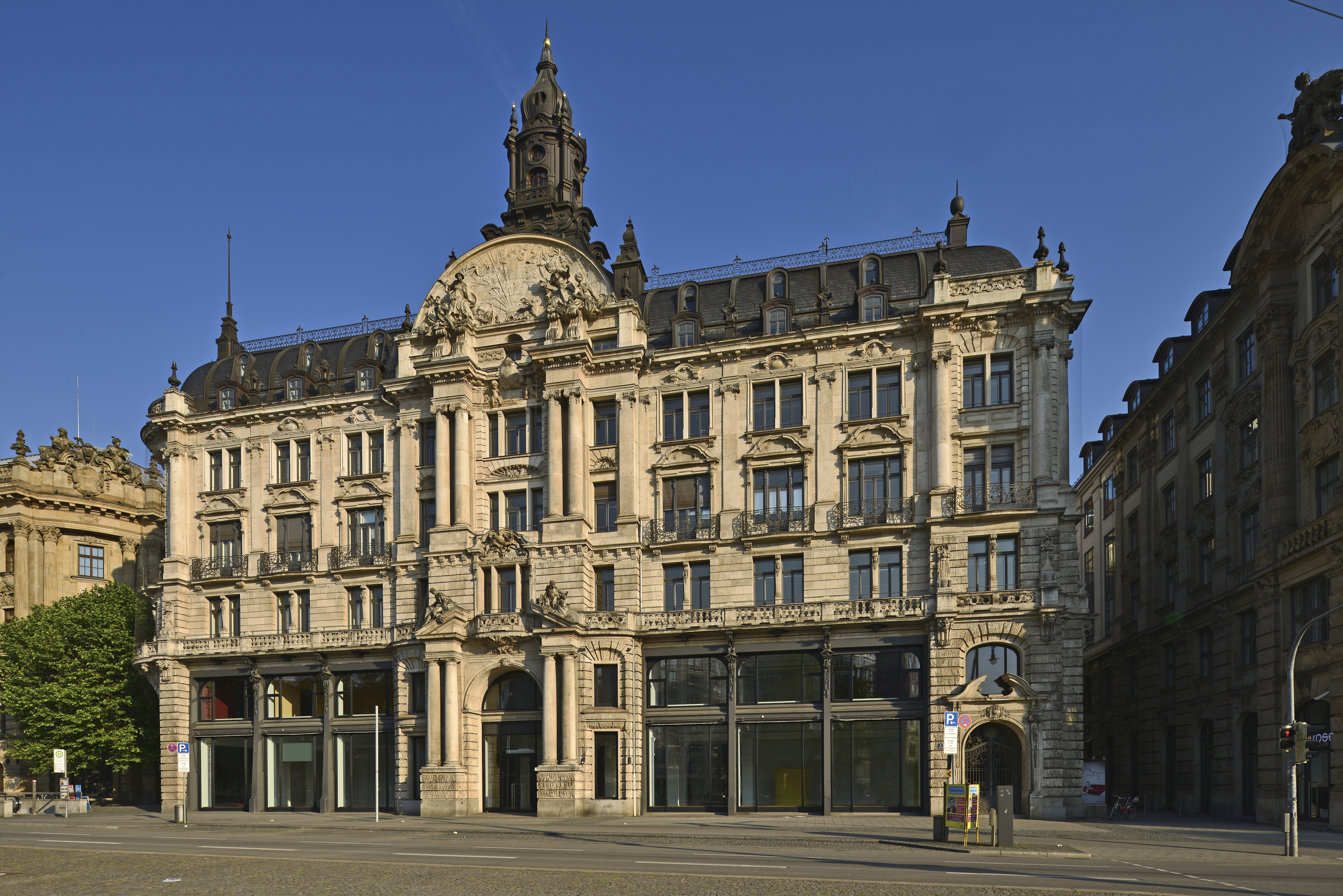 München. Fassadenansicht Lenbachplatz 3.